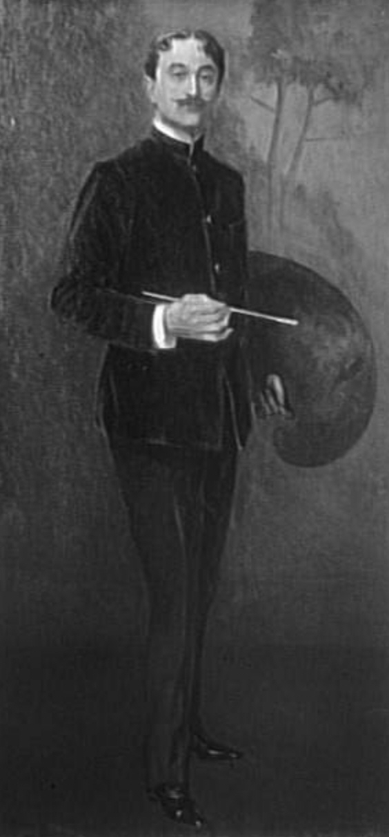 Depicted person: Antonio de la Gandara, exposé au Salon de la Société Nationale des Beaux-Arts de 1909